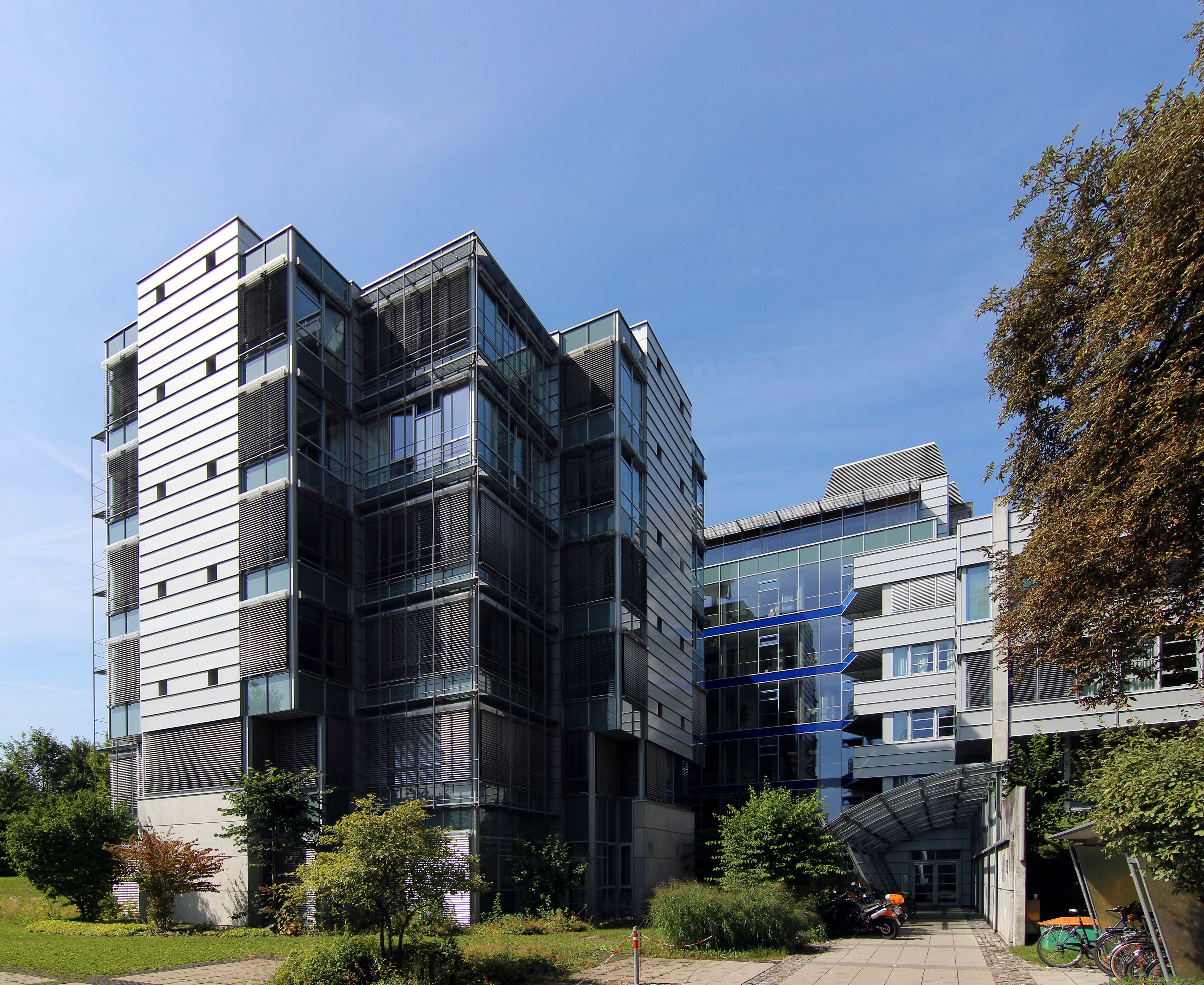 Klinikum Kempten, Praxis für Strahlentherapie